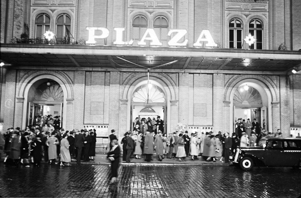 Plaza (Berlin): Portal